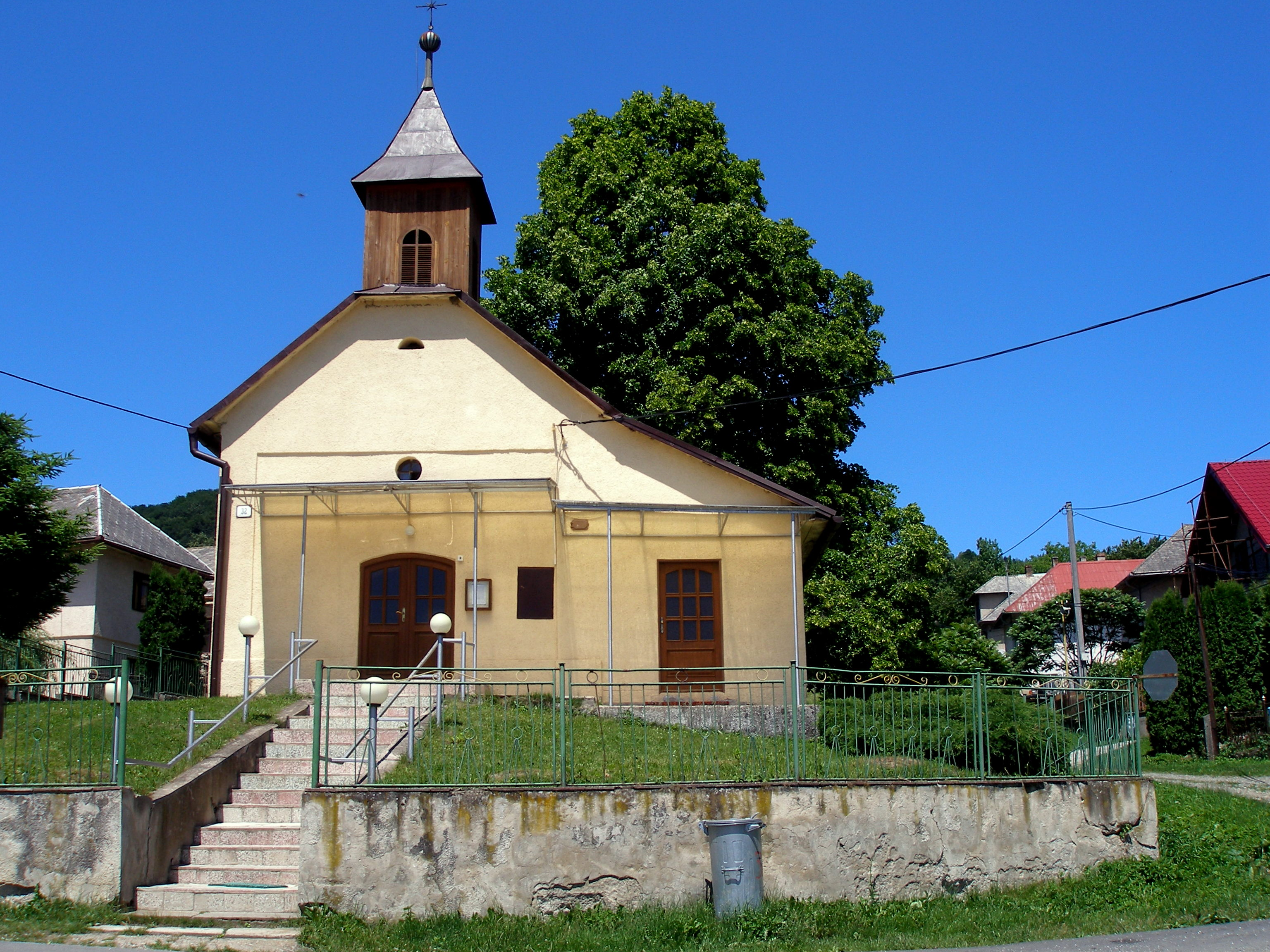 Obec Ratvaj okres Sabinov